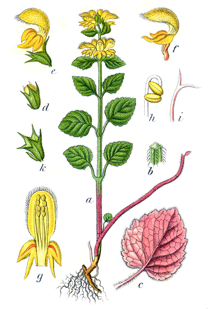 Lamium galeobdolon (L.) L. s. str. Original Caption Goldnessel, Lamium galeobdolon